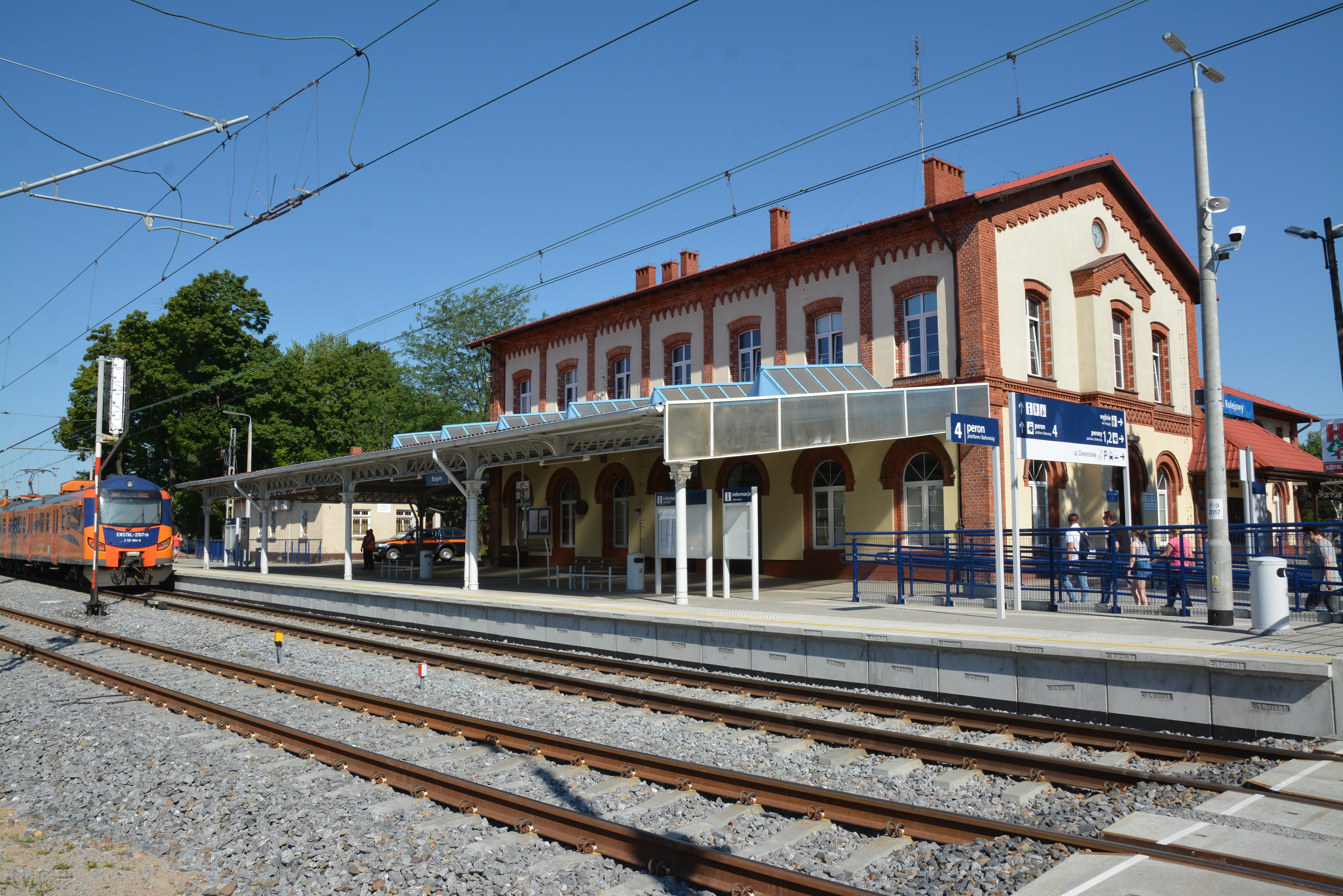 Stacja kolejowa w Rzepinie